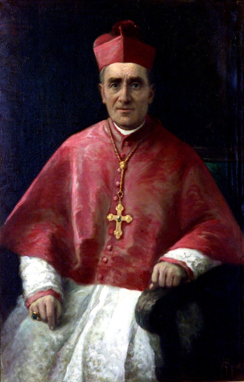 Luigi Maria Marelli (Milano, 24 aprile 1858 – Rho, 14 aprile 1936), vescovo cattolico italiano.